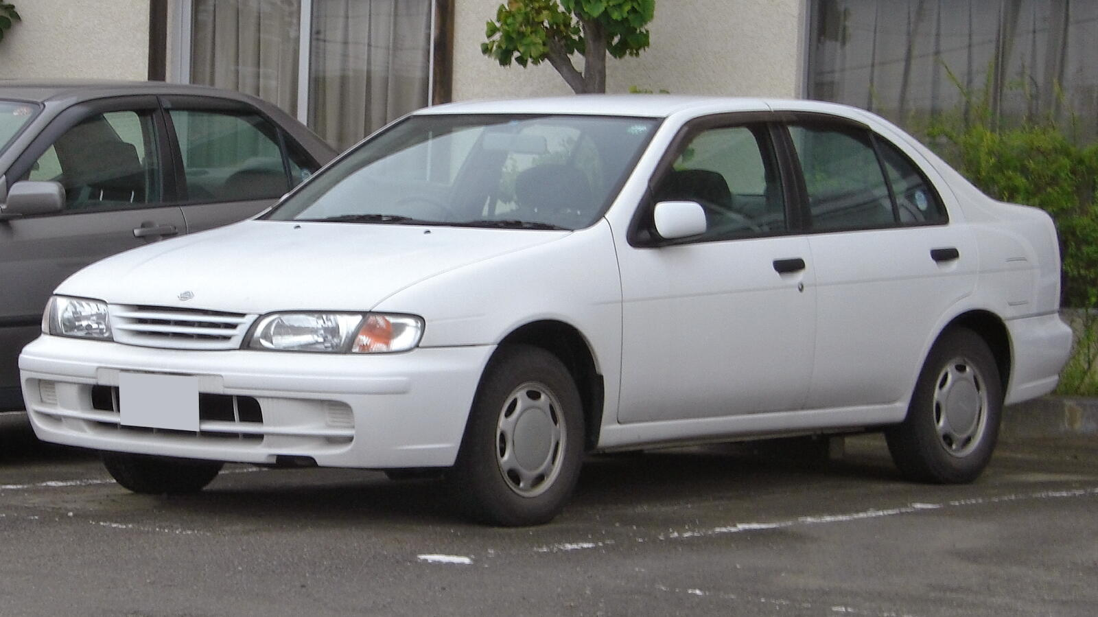 日産・パルサー（N15型セダン 前期型）